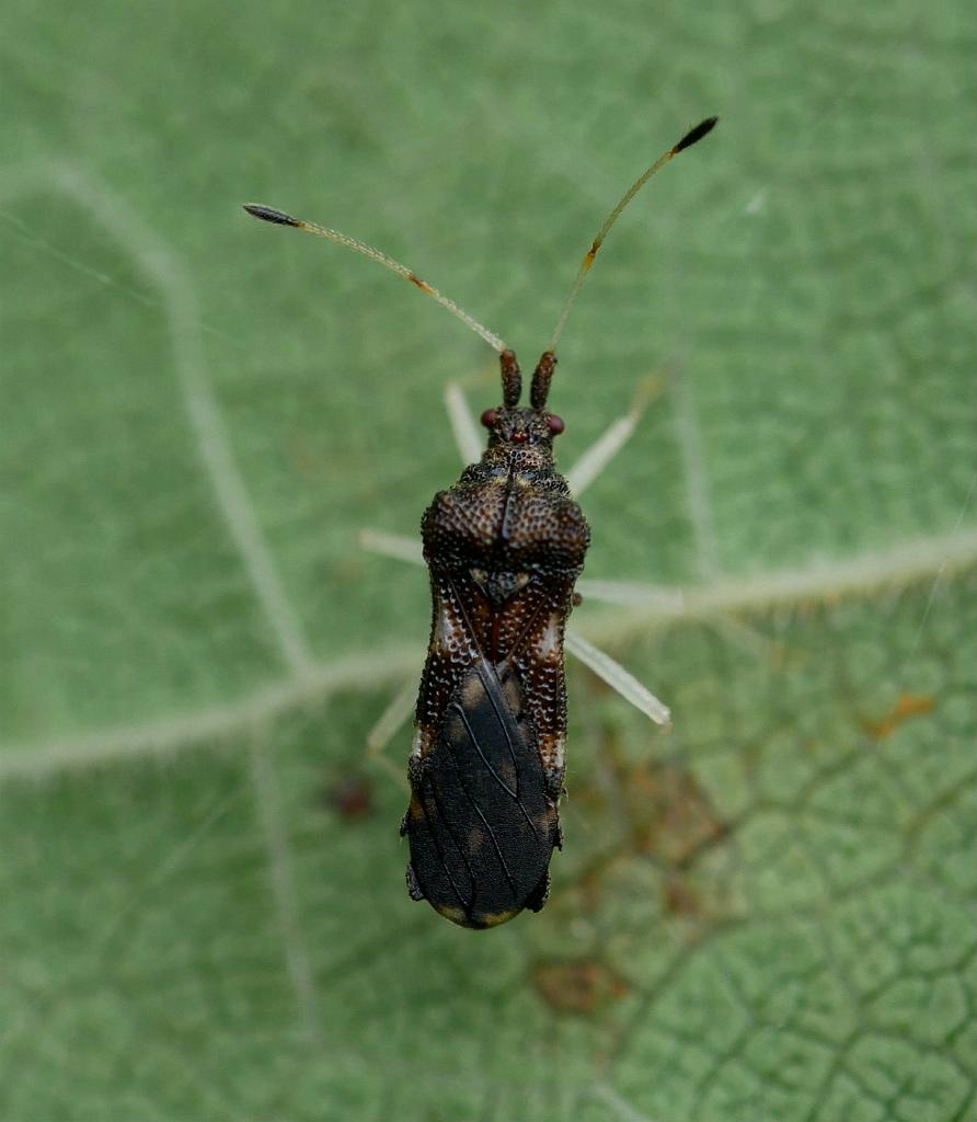 2019/07/25 和歌山県日高川町：Hidakagawa Town, Wakayama Pref. Japan.